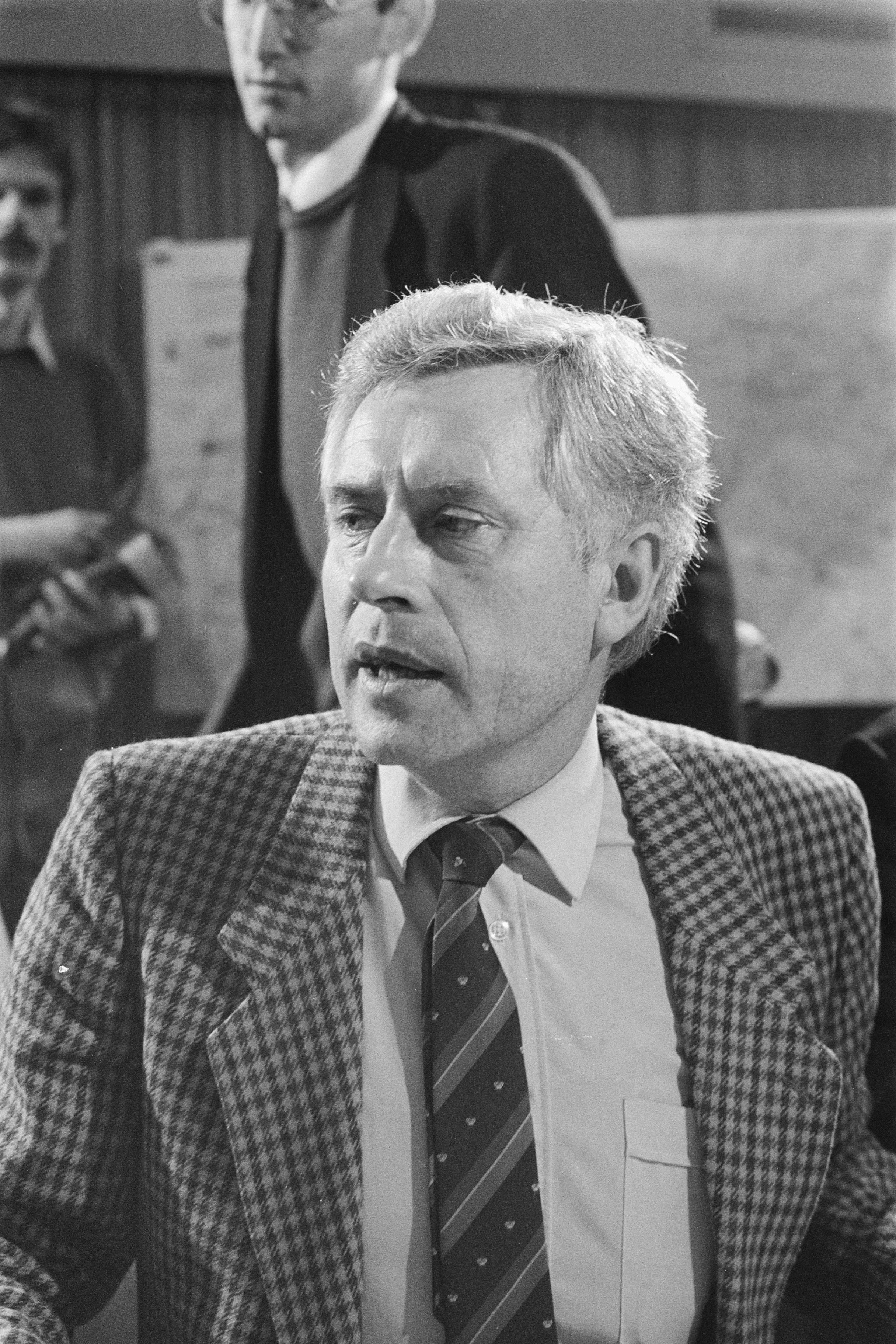 Collectie / Archief : Fotocollectie Anefo Reportage / Serie : [ onbekend ] Beschrijving : Bestuur Ver. Friese Elfsteden en rayonhoofden bij ivm ijstoestand Elfstedentocht) in Leeuwarden; voorzitter Sipkema tijdens vergadering Datum : 14 januari 1985 Locatie : Friesland, Leeuwarden Trefwoorden : Vergaderingen, voorzitters Instellingsnaam : Elfstedentocht Fotograaf : Croes, Rob C. / Anefo Auteursrechthebbende : Nationaal Archief Materiaalsoort : Negatief (zwart/wit) Nummer archiefinventaris : bekijk toegang 2.24.01.05 Bestanddeelnummer : 933-2011